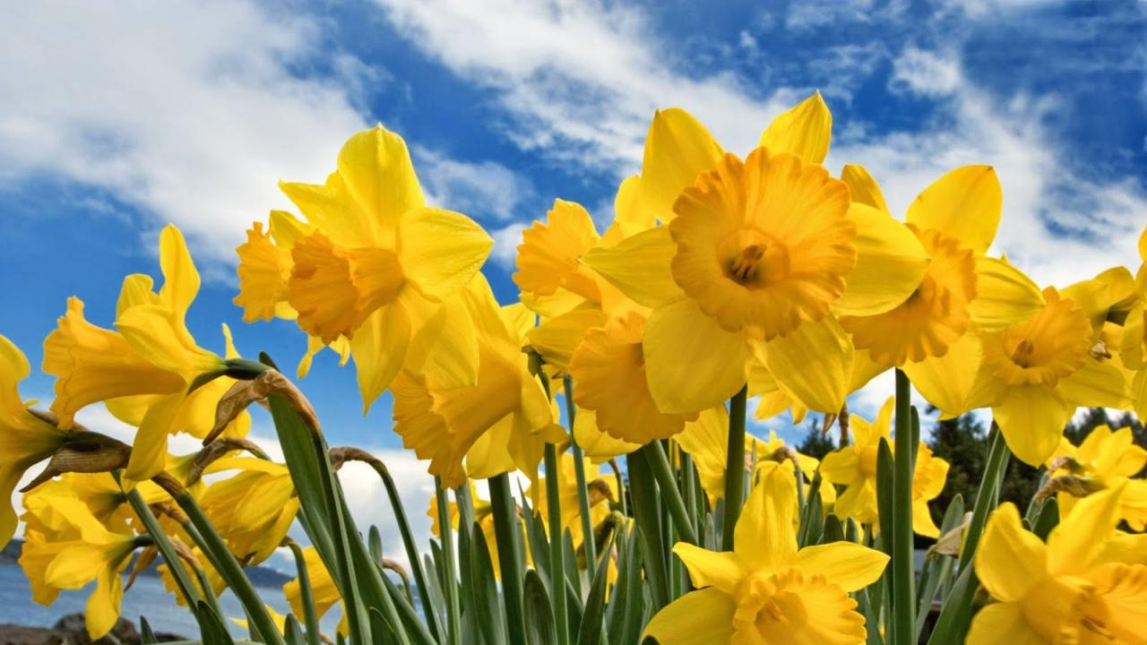 Representa la Naturaleza de mi país, nos atrae su color, sin olvidar que representa la amistad y la alegría